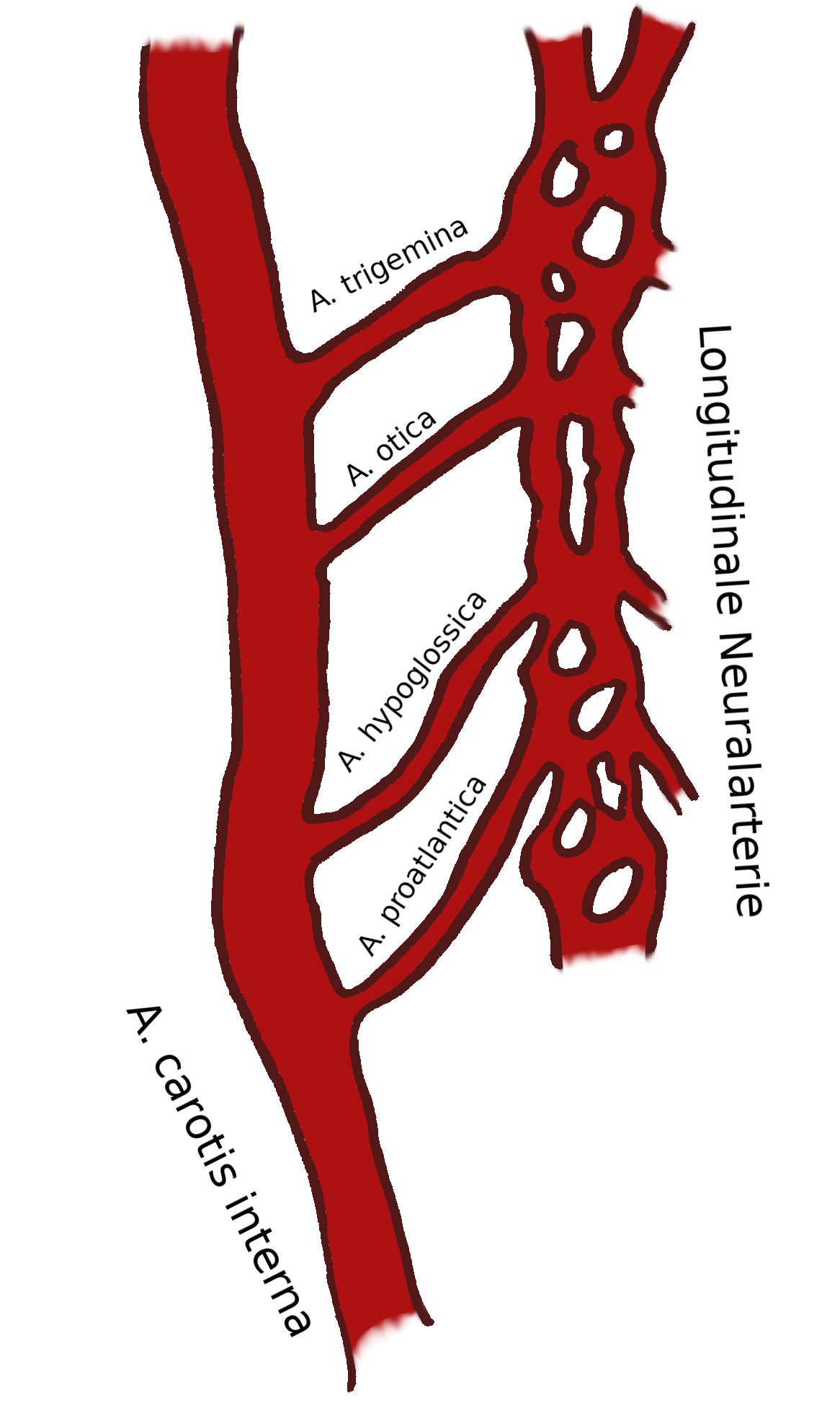 Karotido-basiläre Anastomosen: Schematische Darstellung der embryonalen Verbindungen von der A. carotis interna zur logitudinalen Neuralarterie, die später zur A. basilaris wird. In Anlehnung an K. Menshawi, J. P. Mohr, J. Gutierrez: A Functional Perspective on the Embryology and Anatomy of the Cerebral Blood Supply. In: Journal of stroke. Band 17, Nummer 2, Mai 2015, S. 144–158, PMID 26060802, PMC 4460334